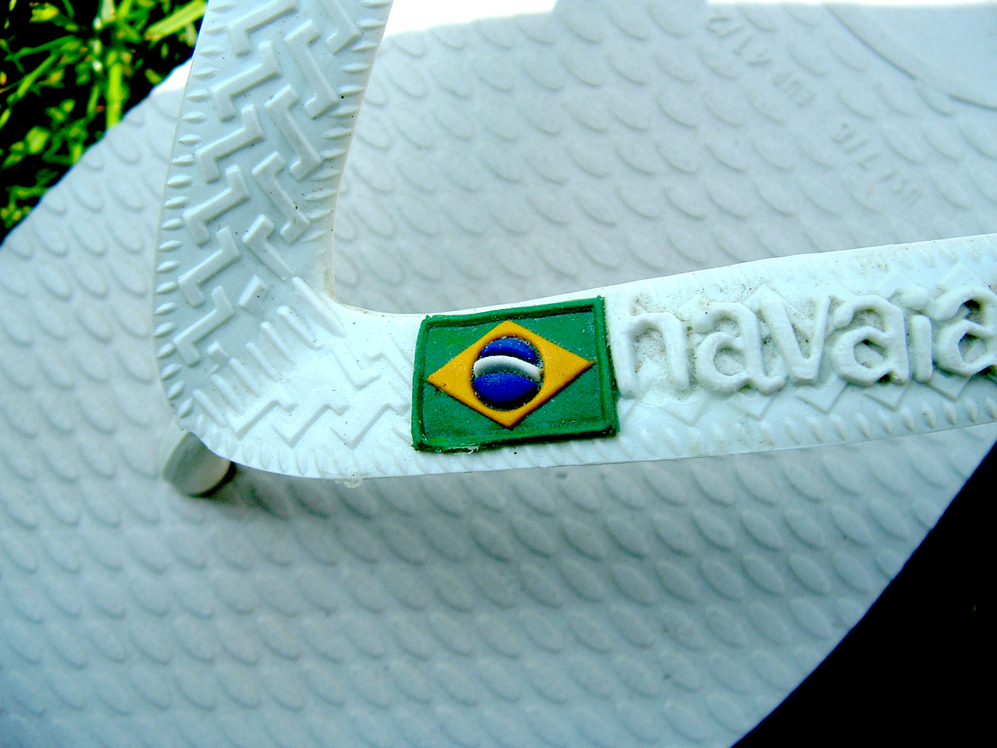 Modelo Brasil de sandálias Havaianas